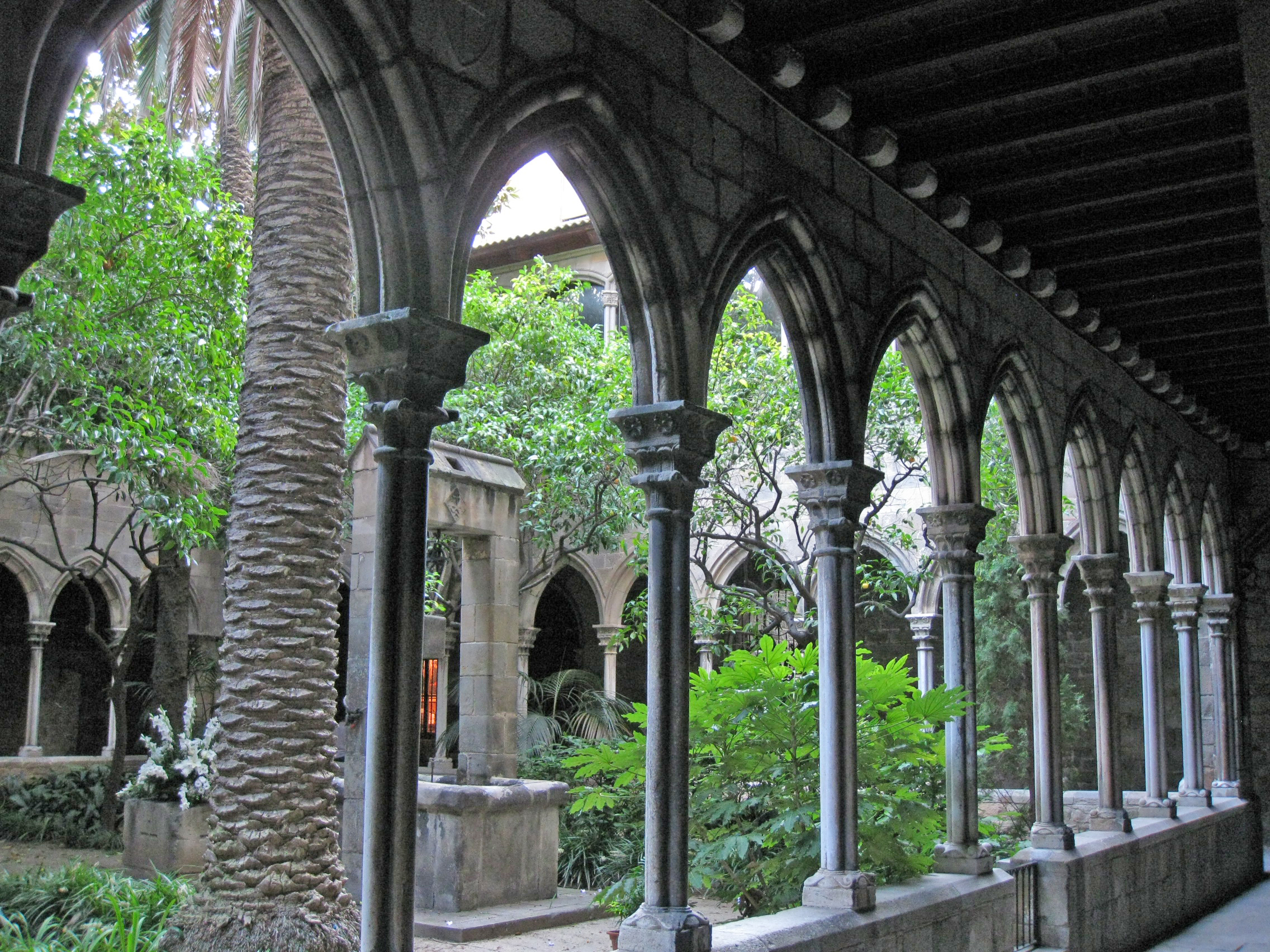 Claustre gòtic de l'antic monestir de Santa Anna, a Barcelona